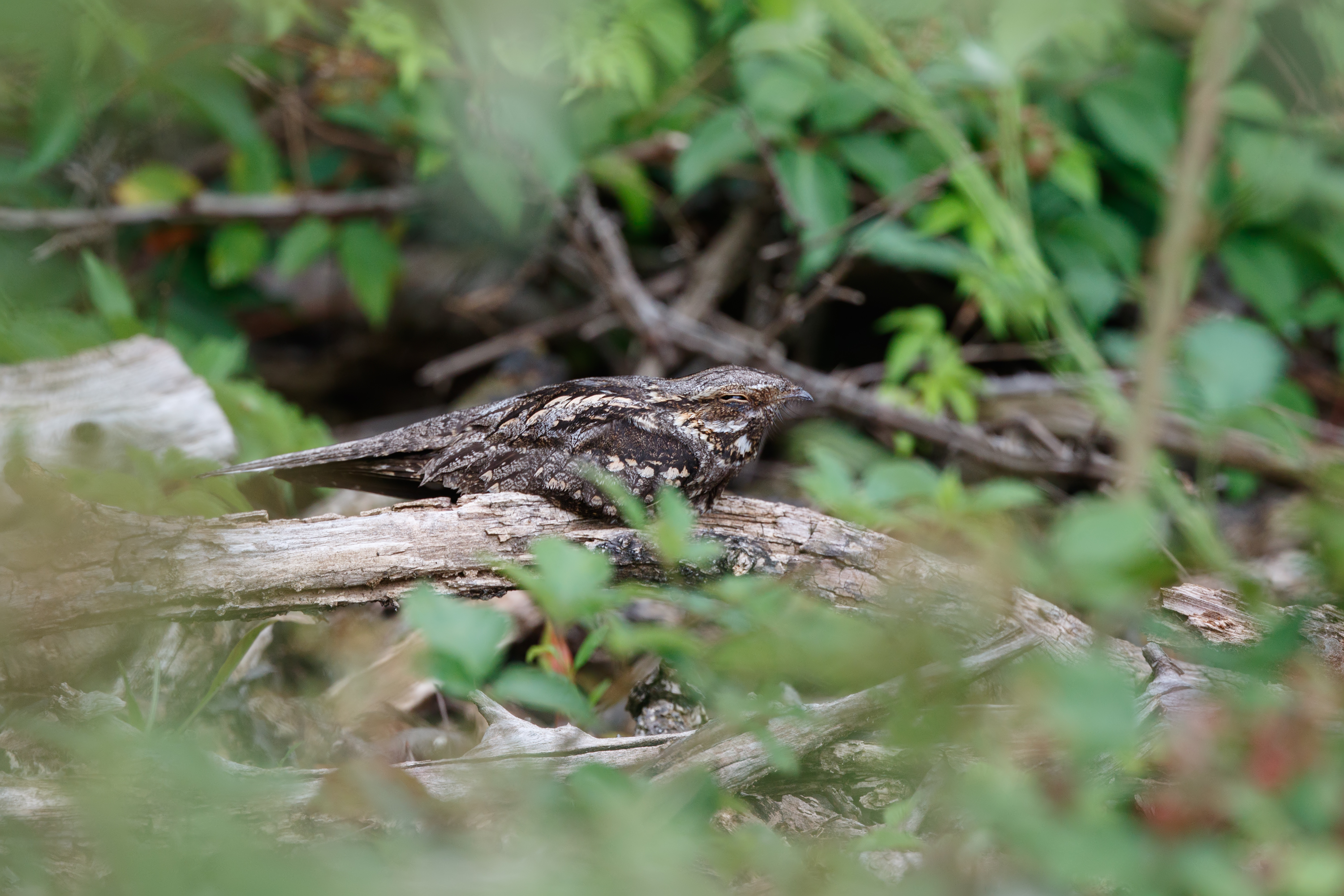 Caprimulgus europaeus (succiacapre) mentre riposa sopra un tronco